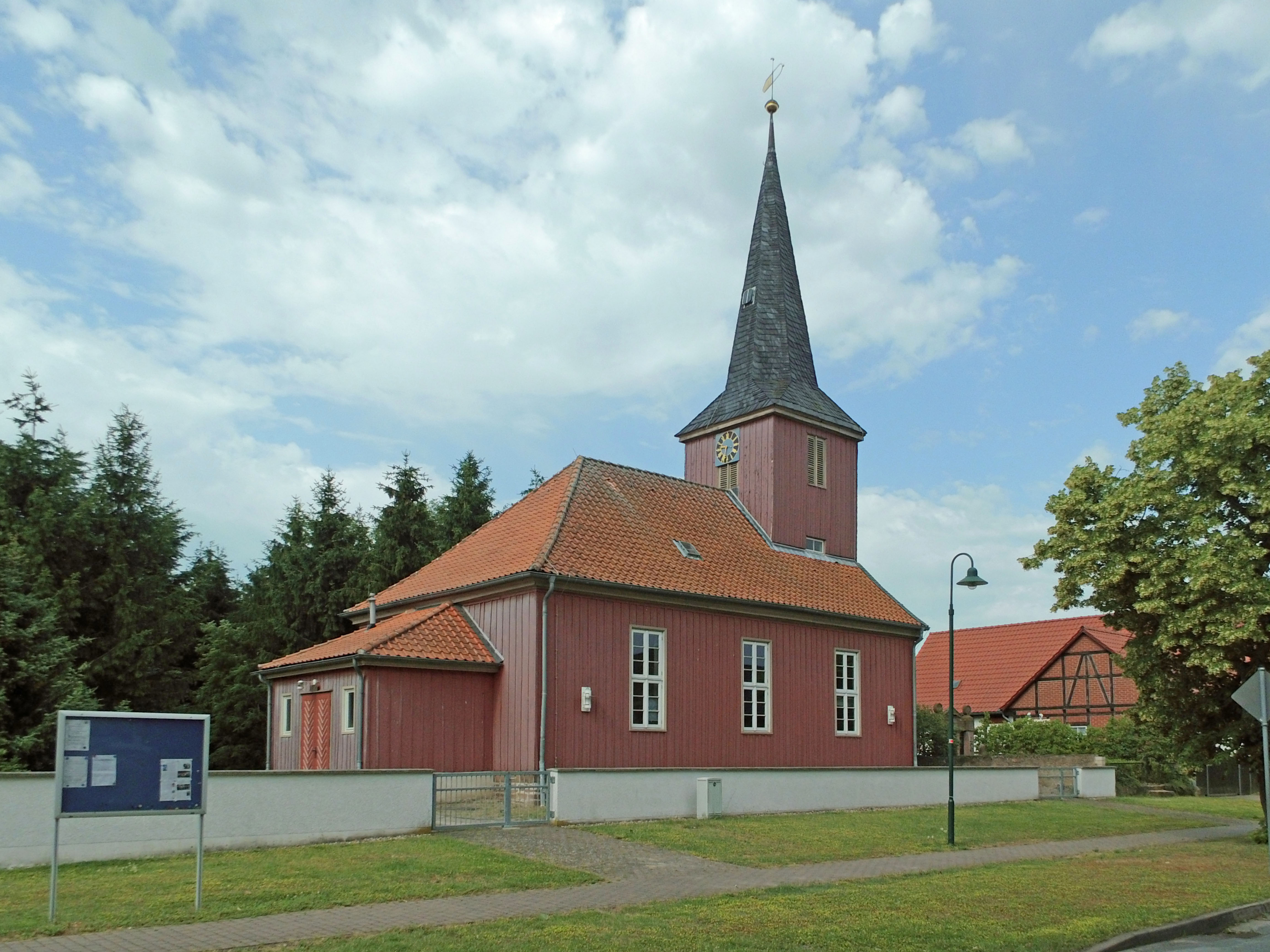 Evangelisch-lutherische Dorfkirche in Jeseritz bei Gardelegen (Sachsen-Anhalt).